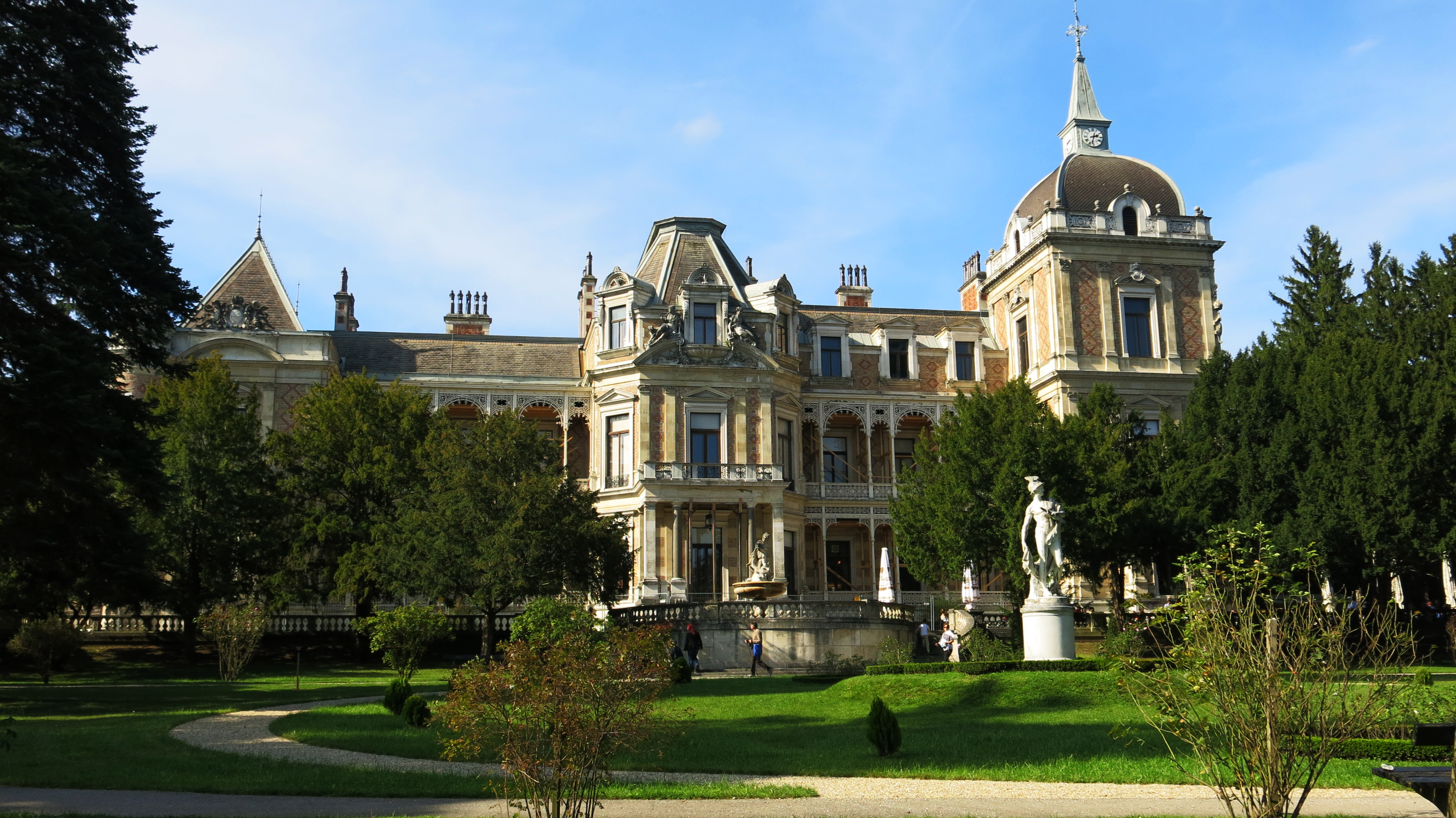 Hermesvilla Dieses Bild wurde anlässlich des österreichischen Tags des Denkmals 2014 in Wien eingereicht.